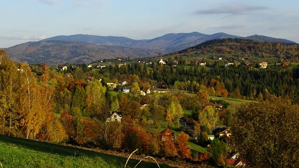 Panorama Lalik. Jesienny Widok na Pochodzitą (na pierwszym planie) Kasperki i Szklankówkę. W tle Beskid Żywiecki. (Od lewej Romanka, Przełęcz Pawlusia, Rysianka Lipowska, )